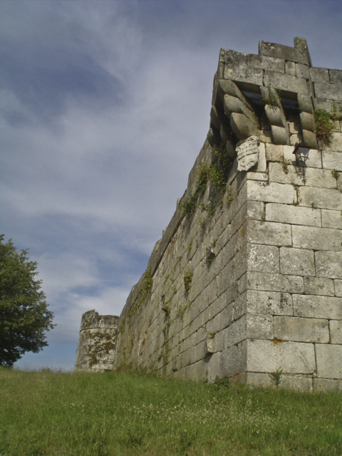 Castelo de Maceda, vista parcial.